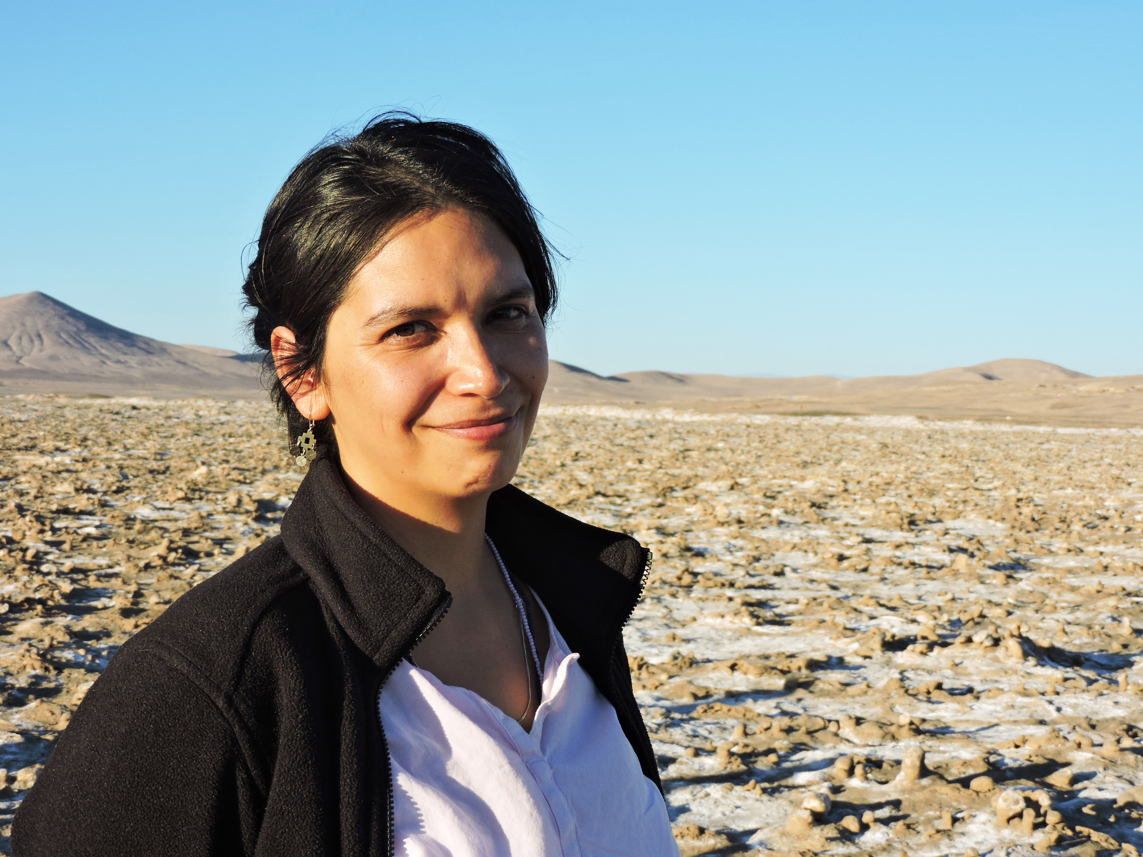 Trabajo de campo